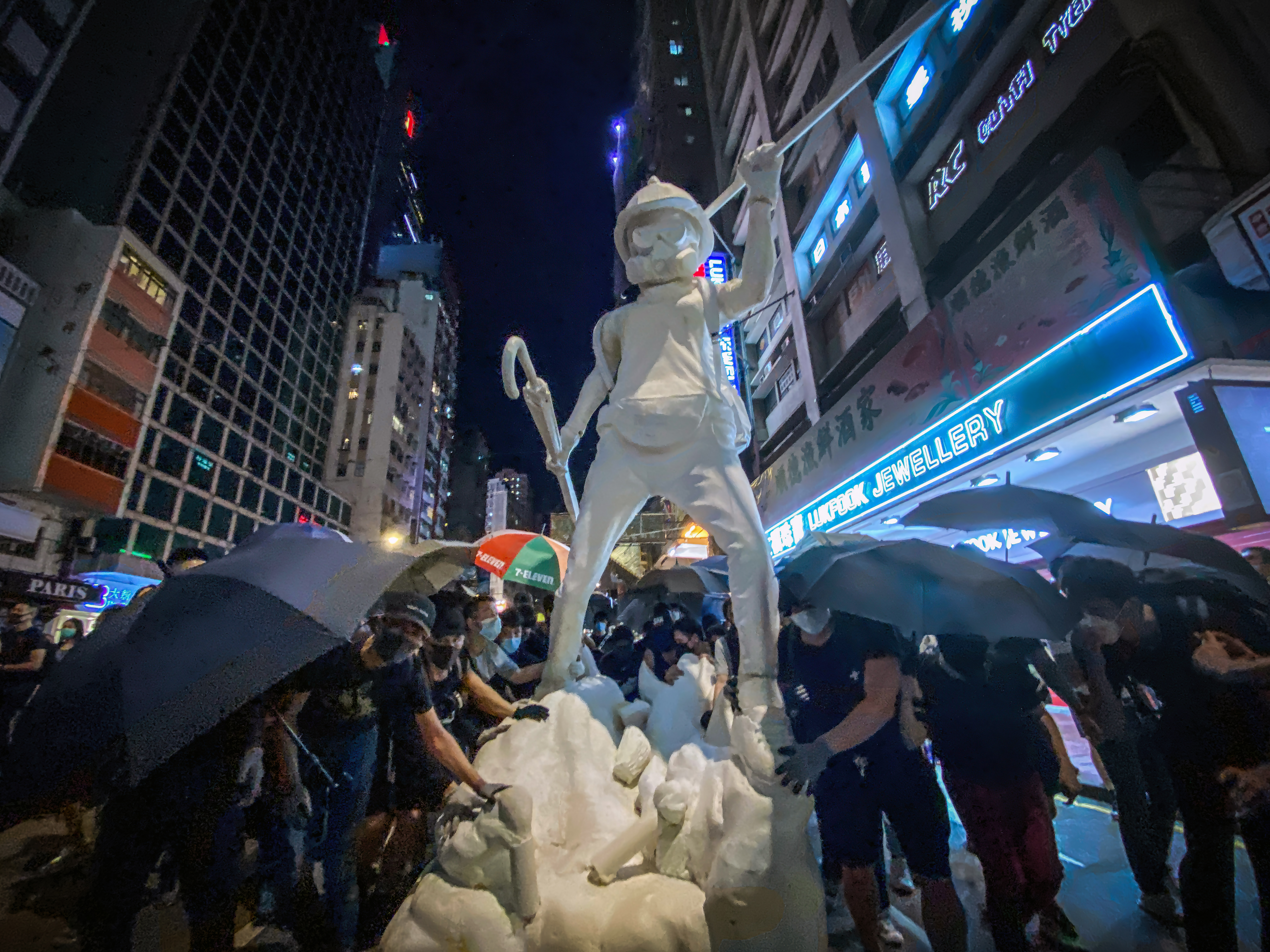 2019-10-04 Protesten in Hong Kong